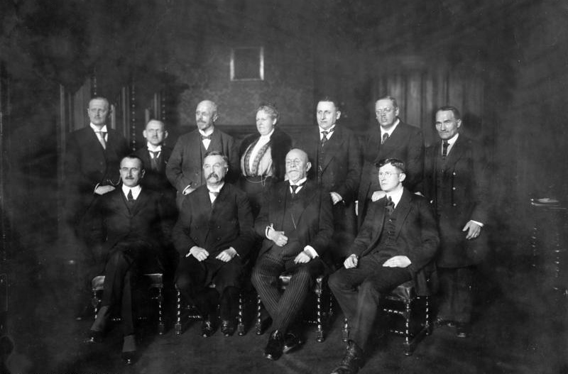 Deutsche Zentrumspartei, Präsidium Parteitag der Zentrumspartei Präsidium Sitzend von links nach rechts: [Alois] Fürst Löwenstein, Fehrenbach, Geh. Rat Porsch, Elfes Stehend von links nach rechts Prof. Most, Dr. Lammerich, Dr. jur Bauer, Kar. San. Rat Dr. Driesen [?], Chefred. Herslein [?], Abg. Hauser [?], Lorenz Blank [1. Reihe sitzend vlnr: Aloys Prinz zu Löwenstein-Wertheim-Rosenberg, Dr. Constantin Fehrenbach, Dr. Felix Porsch, Wilhelm Elfes 2. Reihe stehend vlnr: Most [?], Dr. Lammerich [?], Dr. Sebastian Bauer, Dr. Driesen [?], Herslein [?], Abg. Hauser [?], Lorenz] Abgebildete Personen: Löwenstein-Wertheim-Rosenberg, Aloys Prinz zu: 1871-1952; Jurist, MdR, Zentrum, Präsident des Zentralkomitees der deutschen Katholiken, Deutschland Fehrenbach, Constantin Dr.: Reichskanzler, Zentrum, Deutschland Porsch, Felix Dr.: Vizepräsident (MdL) des Landtages von Preußen, Zentrum, Deutschland Elfes, Wilhelm Dr.: Mitglied des Präsidiums des Friedenskomitees, Bundesrepublik Deutschland Information added by Wikimedia users.